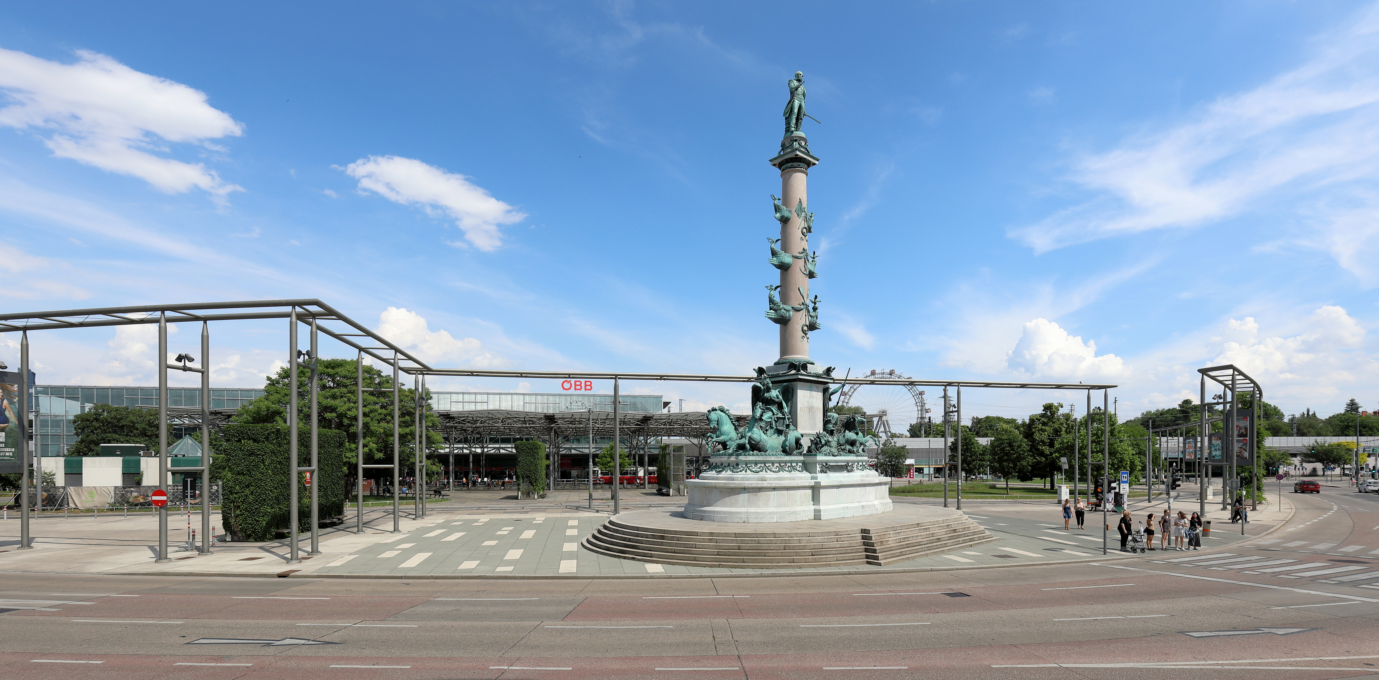 Die Westansicht des Pratersterns mit dem Tegetthoff-Denkmal im 2. Wiener Gemeindebezirk Leopoldstadt. Links im Hintergrund der Bahnhof Wien Praterstern und rechts hinter dem Denkmal das Riesenrad. Die Benennung Praterstern erfolgte offiziell 1879 aufgrund der damals hier sternförmig zusammenlaufenden sieben Straßen. Im Zuge des Umbaus bzw. Neubaus des Bahnhofs Wien Praterstern (zuvor Bahnhof Wien Nord) von 2004 bis 2008 erfolgte eine Neugestaltung des Praterstern; unter anderem durch die „eigenwillige“ Pergola. Das Denkmal im Vordergrund wurde zu Ehren Wilhelm von Tegetthoff errichtet und am 21. September 1886 enthüllt.